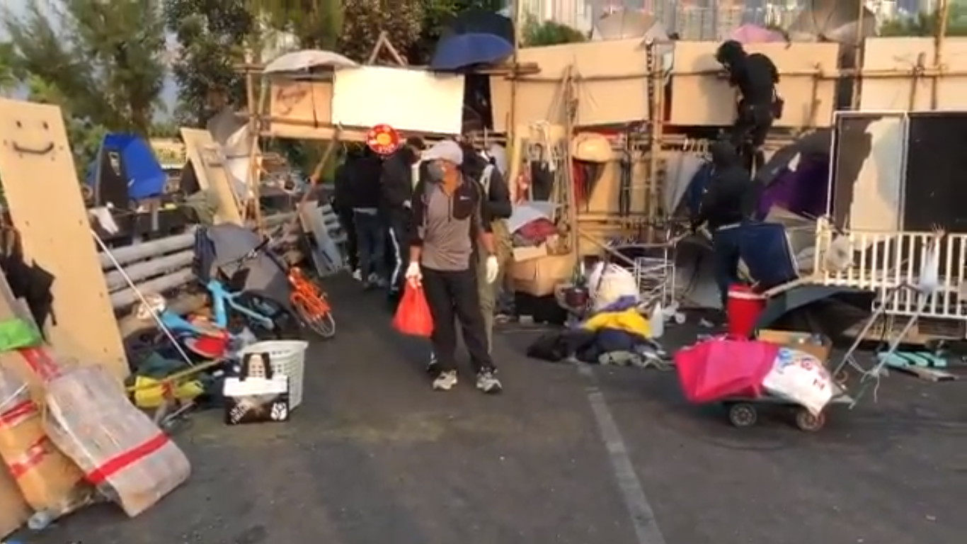 11月14日，#香港中文大学 2号桥上一个出入口，黑衣人在检查进入校园人员的随身物品。他们说，这么做是防止警察混入校园。